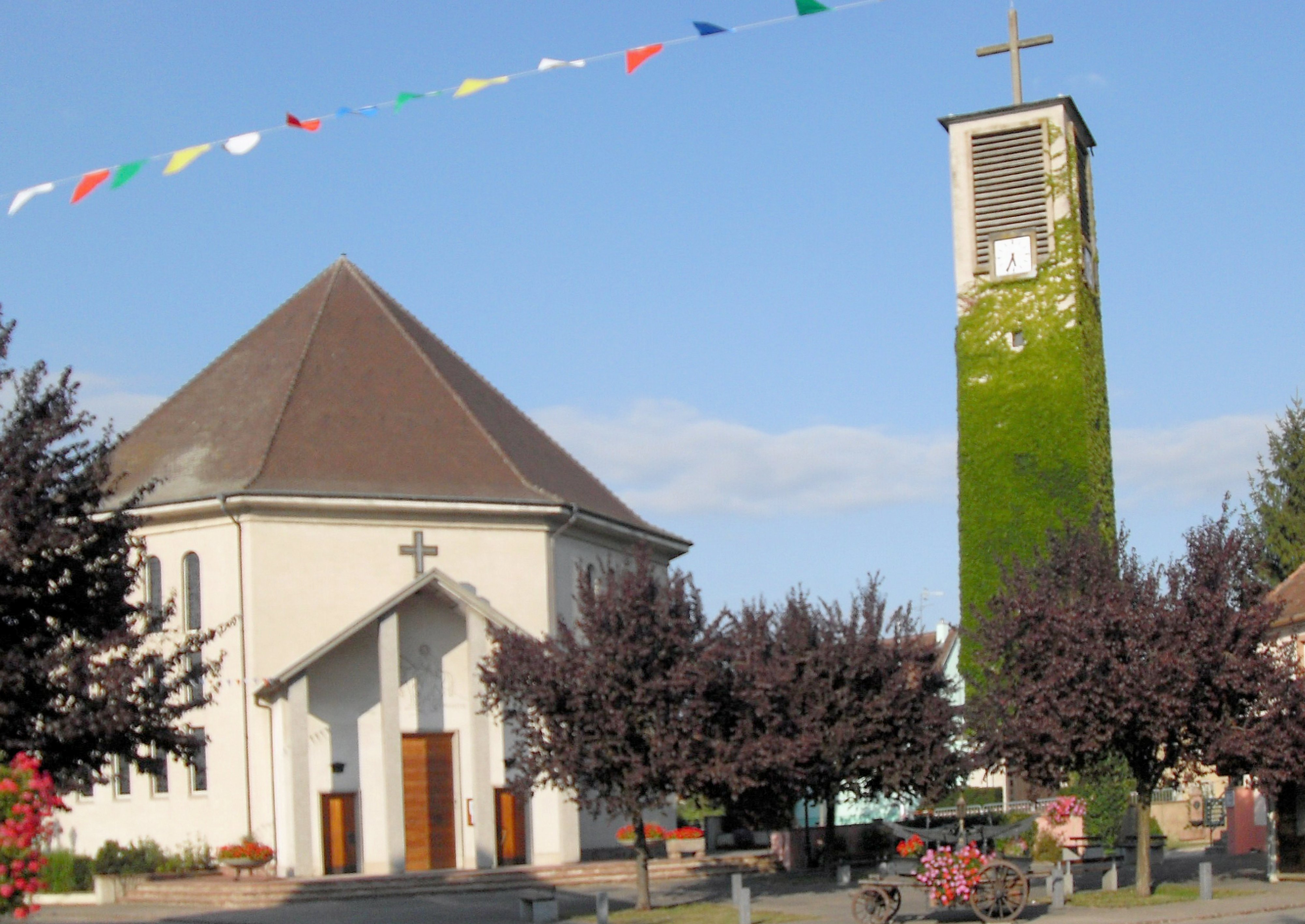 L'église Saint-Martin à Holtzwihr